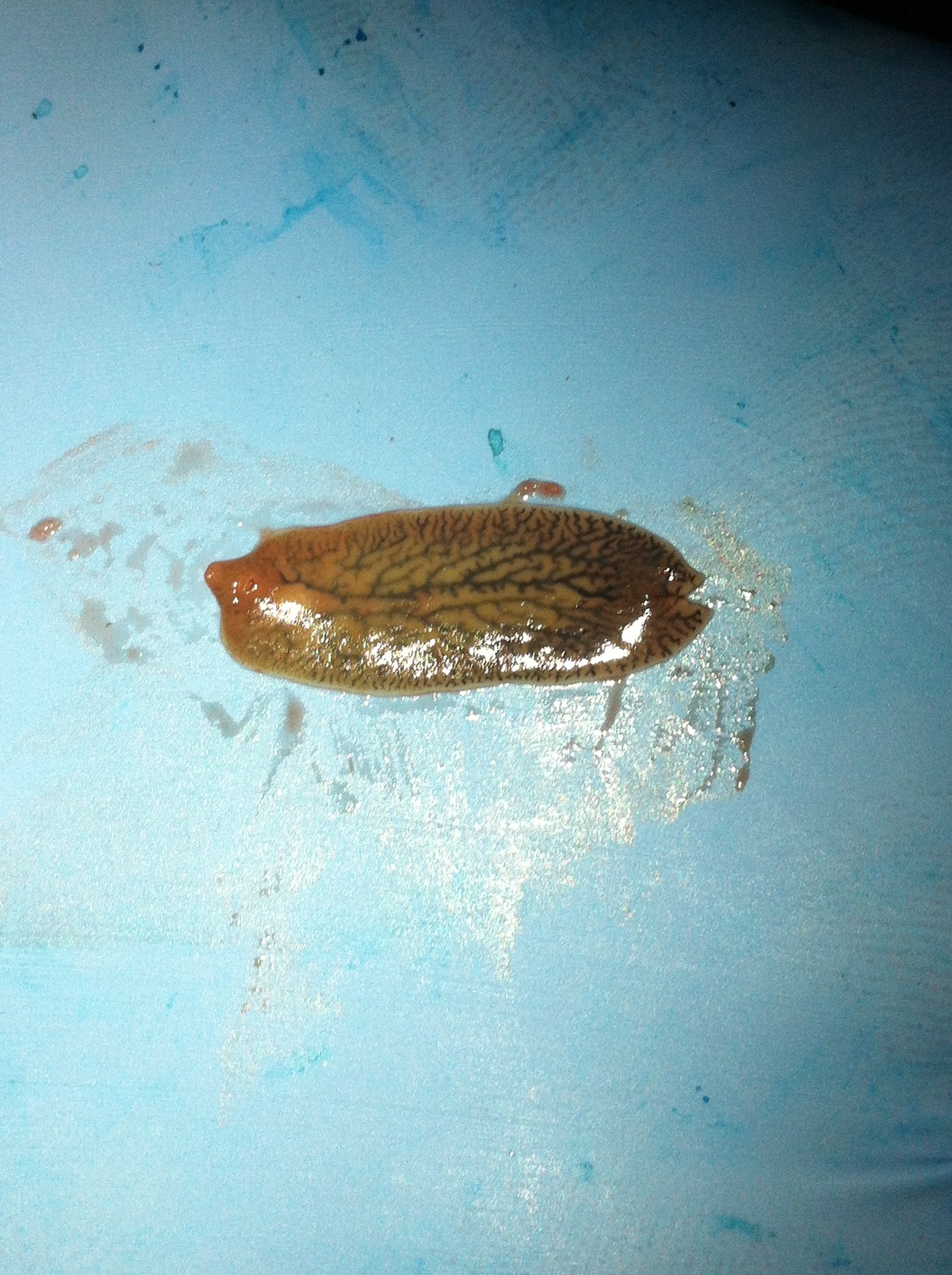 Fasciola hepática Fasciola